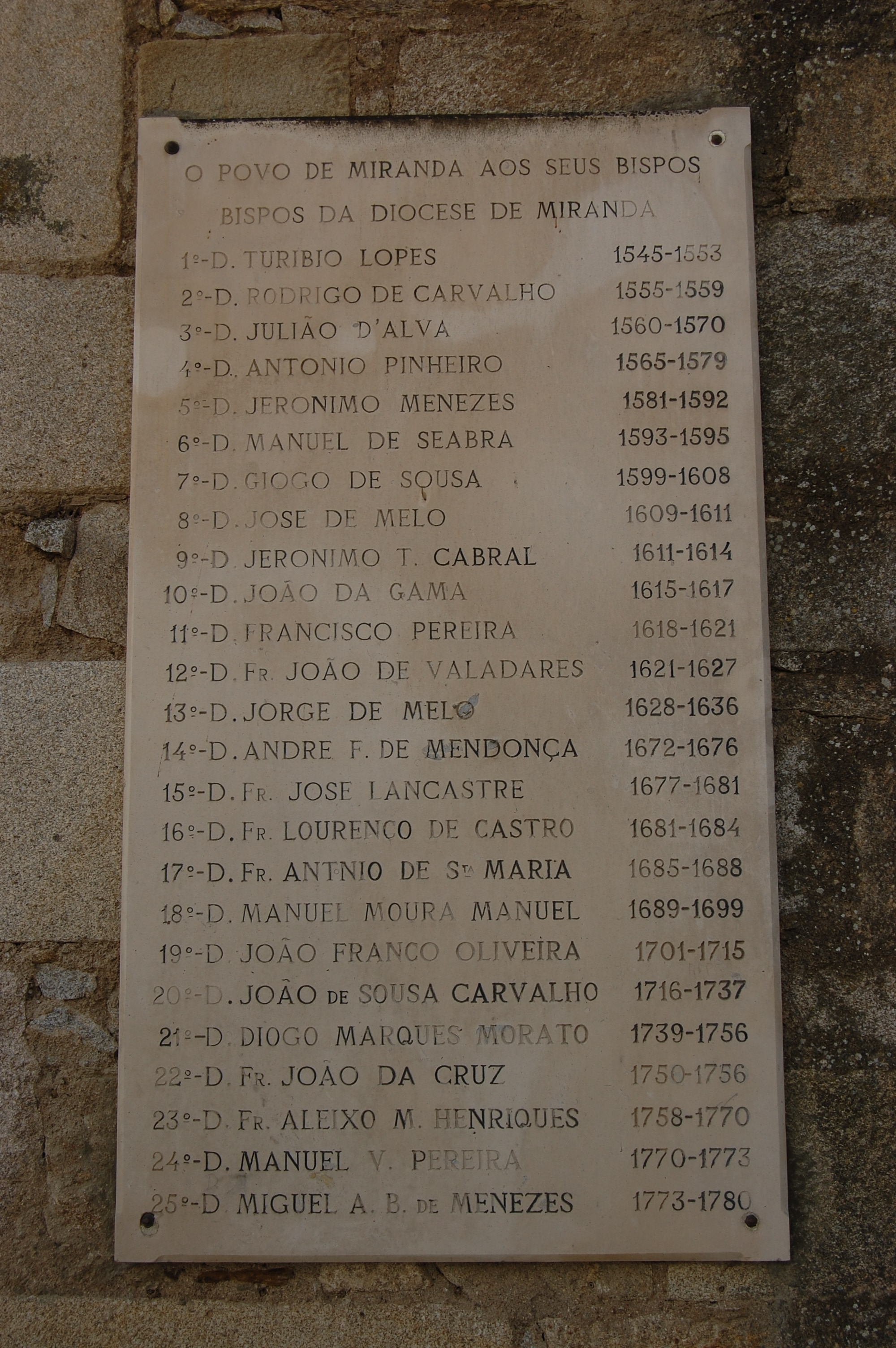 Miranda do Douro, Portugal.